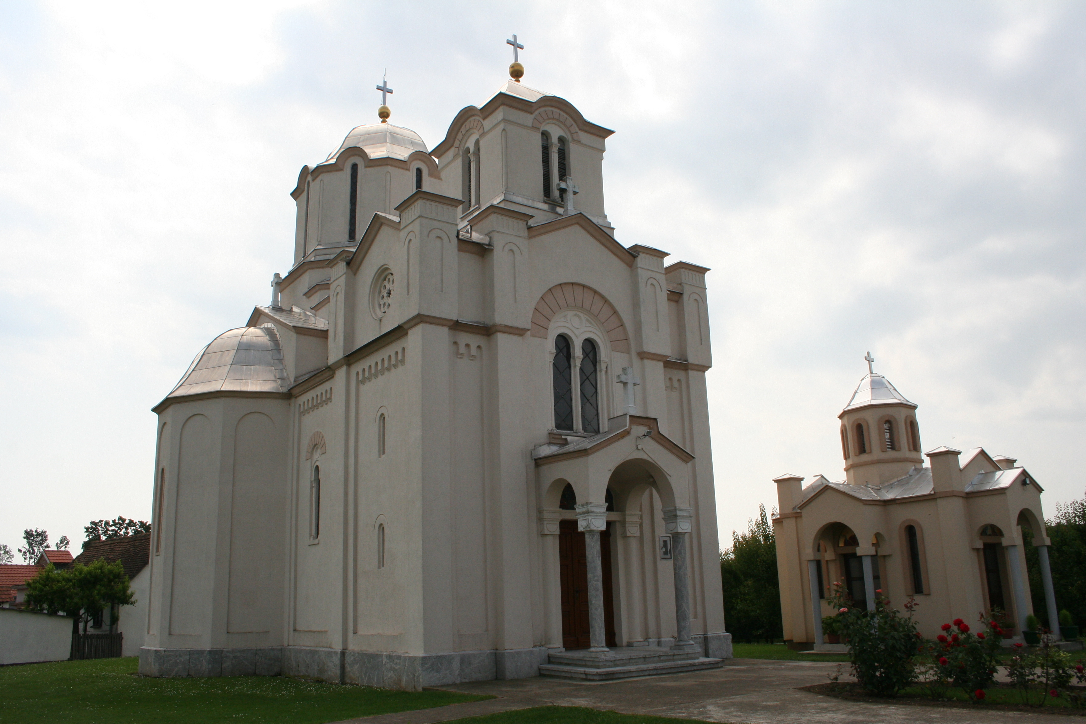 Crkva Svete Trojice u Zasavici II